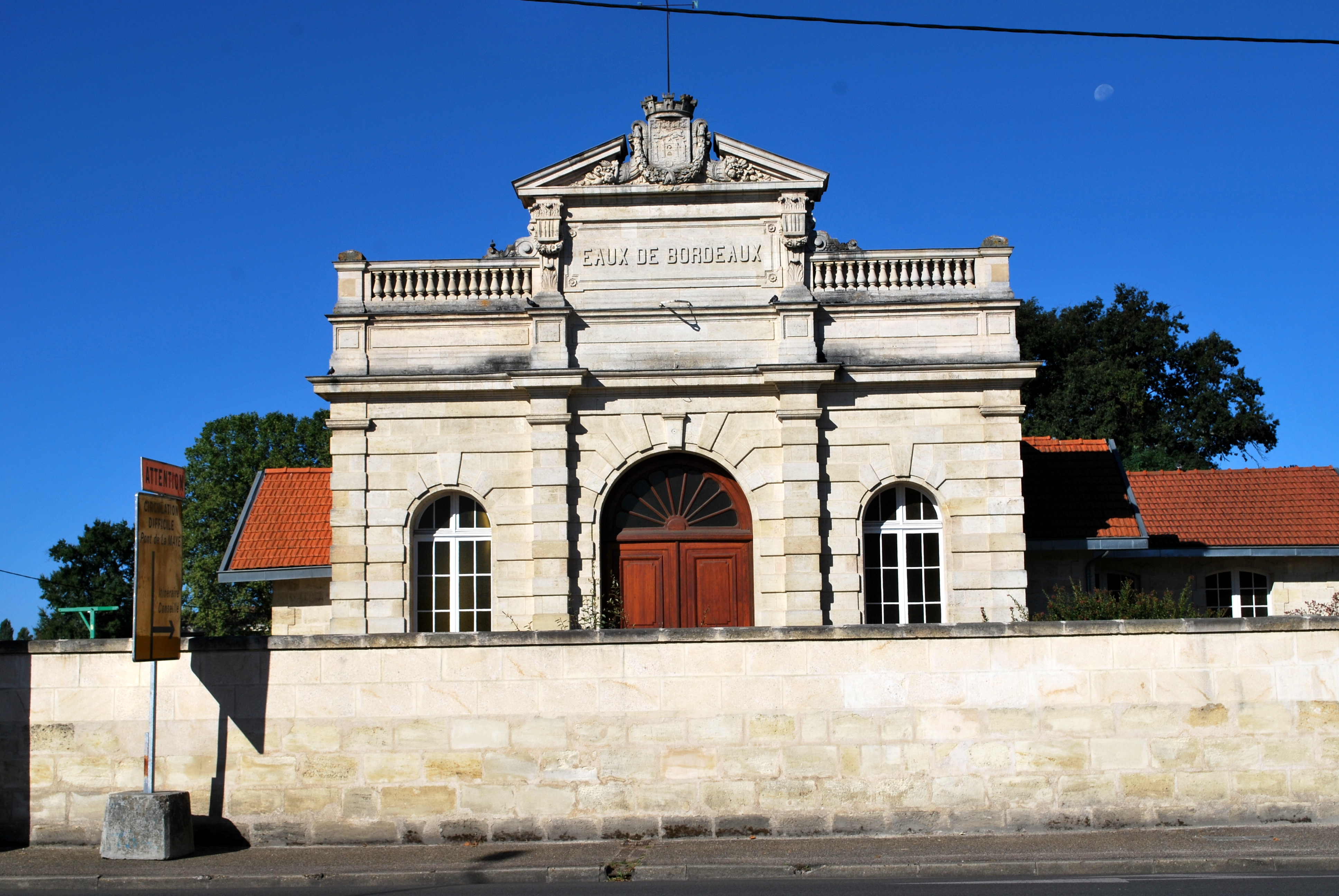 Aqueduc de Budos - Villenave-d'Ornon usine du Béquet